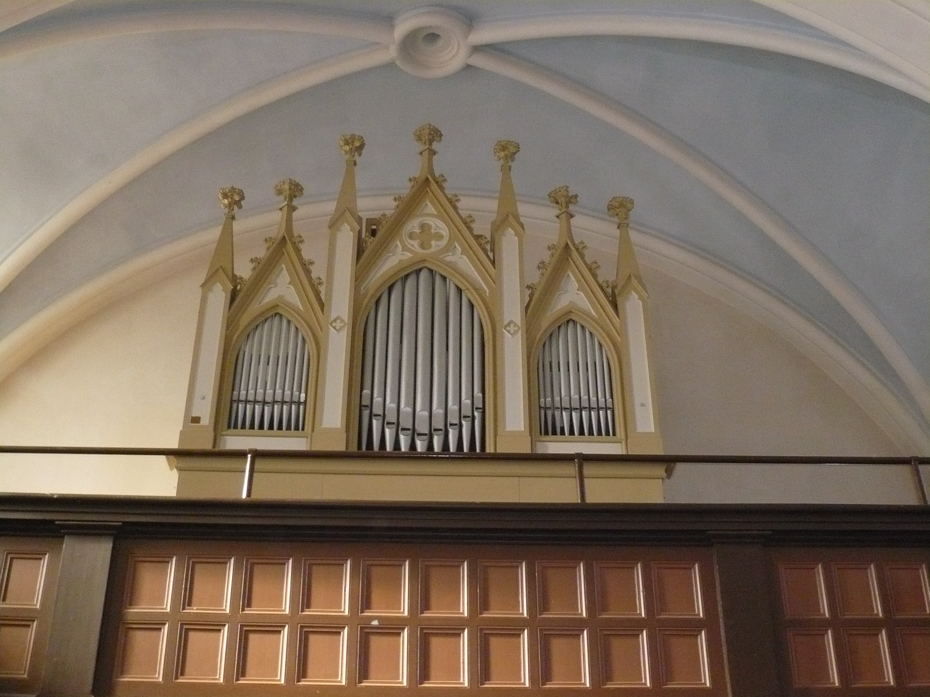 Ortsteil Marzahn, ev. Dorfkirche, Orgel